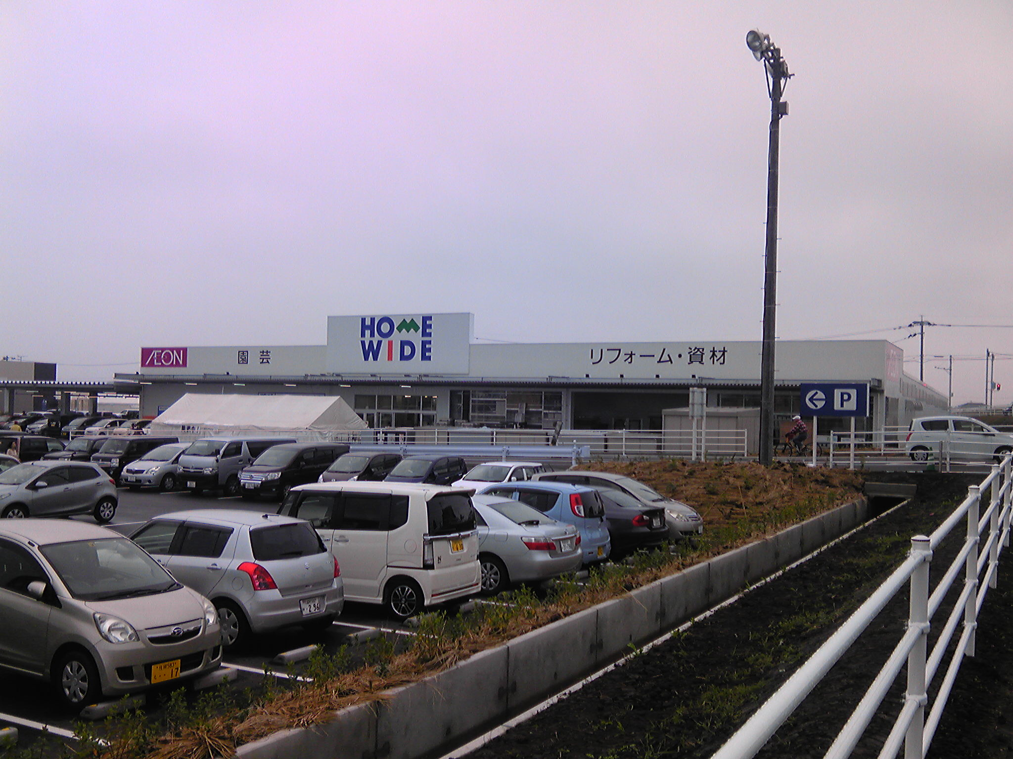 ホームワイド小郡店（福岡県小郡市）